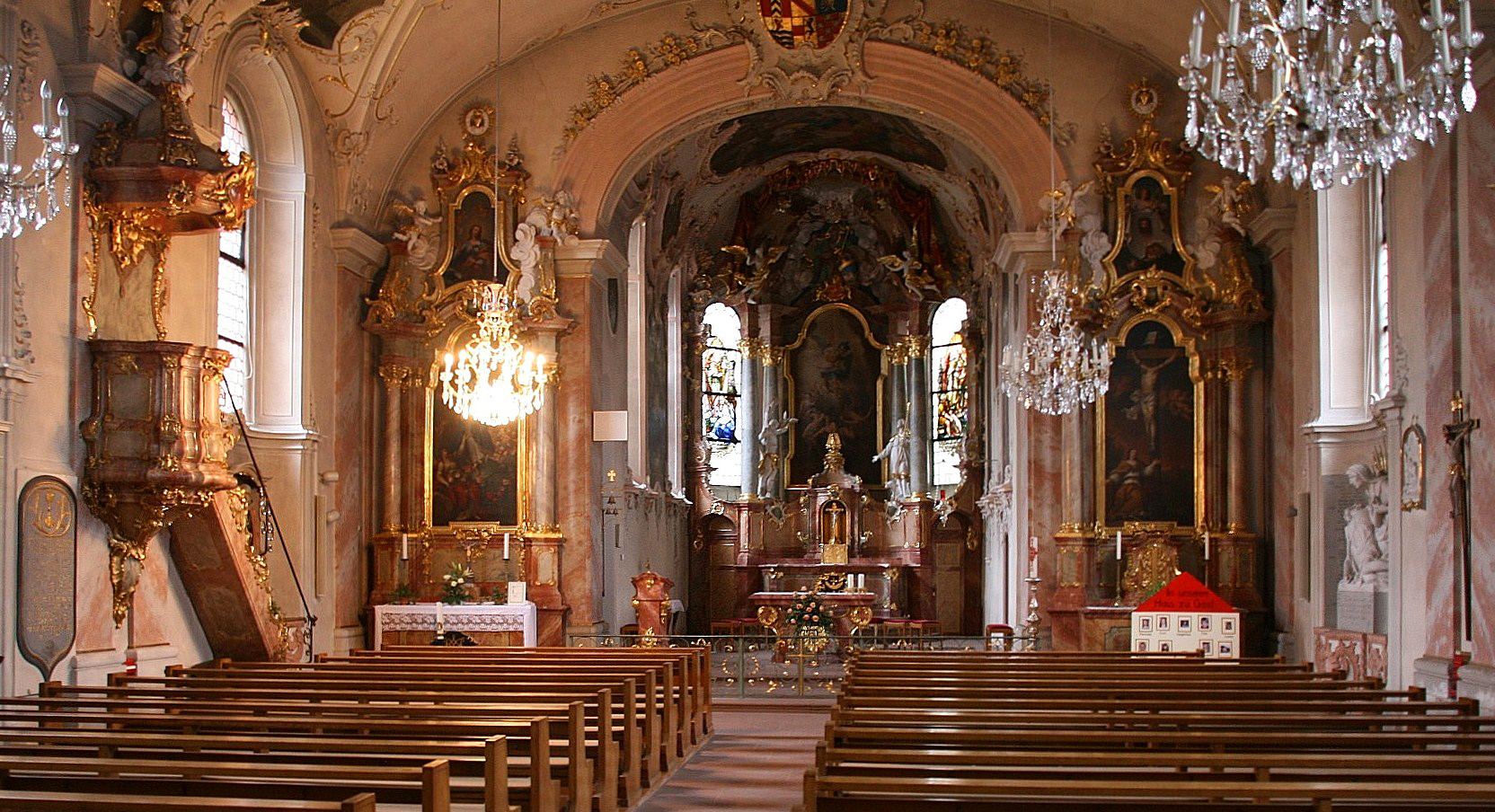 Der Innenraum der katholischen Kirche St. Michael in Appenweier (Ortenaukreis, Baden-Württemberg). Im Bild der Chor mit Hochaltar und Zelebrationsaltar, rechts und links Seitenaltäre, ganz links die Kanzel - die gesamte Ausstattung zeigt prachtvollen Barockstil.